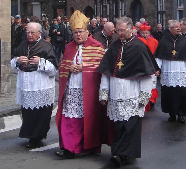 Prelatuurstoet, bloedprocessie